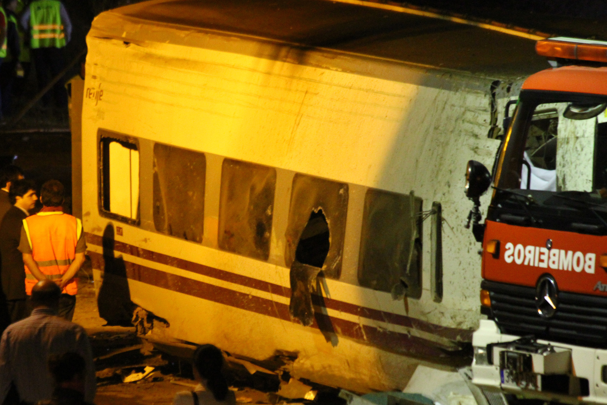 Fotos que hice in situ del accidente ferroviario ocurrido este 24 de julio cerca de Santiago de Compostela. En el momento de escribir estas líneas ya se cuentan 65 muertos. Es el peor accidente ferroviario de España en los últimos 40 años. Tragedy in Santiago de Compostela Photos I made on-site of the train crash on July 24 near Santiago de Compostela. At the time of writing are counted 65 dead. It is the worst rail accident in Spain in the last 40 years.